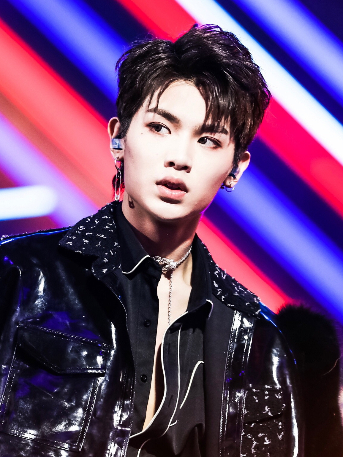 20180406 出道舞台 眼睛里的星星完全藏不住啊 你是妈妈最骄傲的小明星呀～ 出道快乐宝贝，走花路吧❤️ ● 明星● 偶像● 饭拍● 黄明昊● 偶像练习生